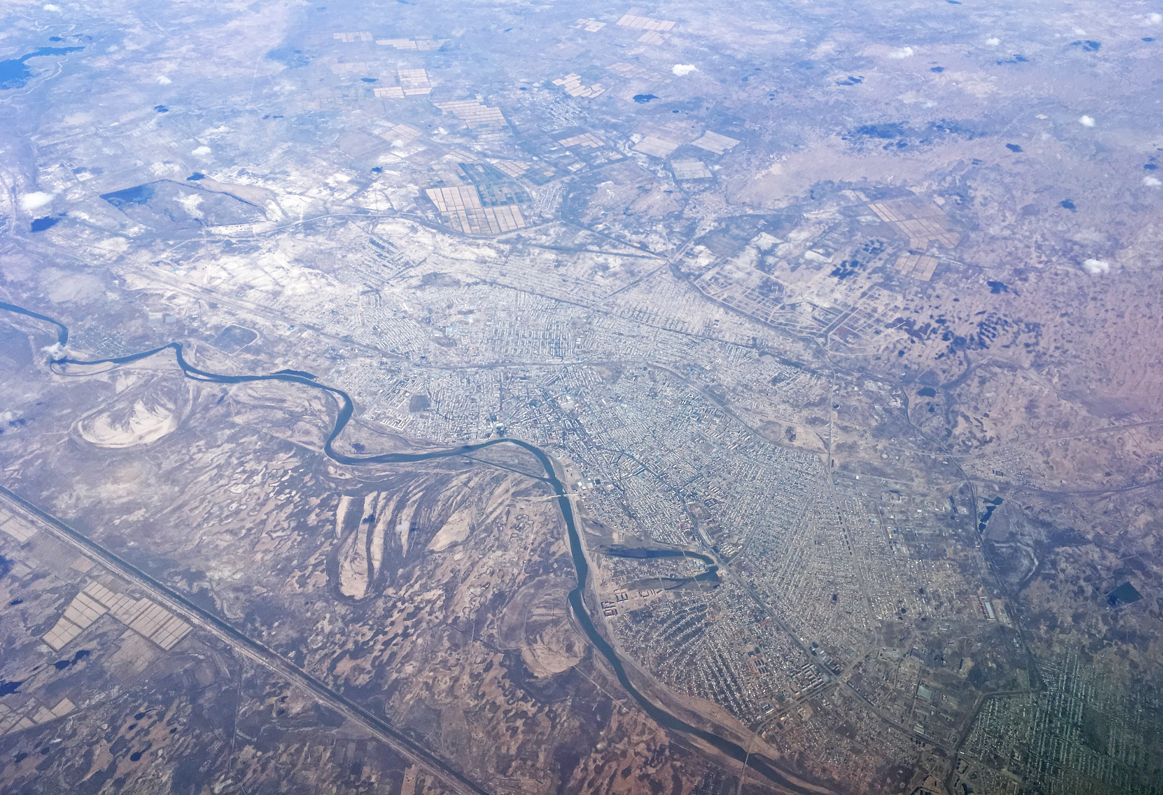 Kasachstan: Luftaufnahme von Qysylorda